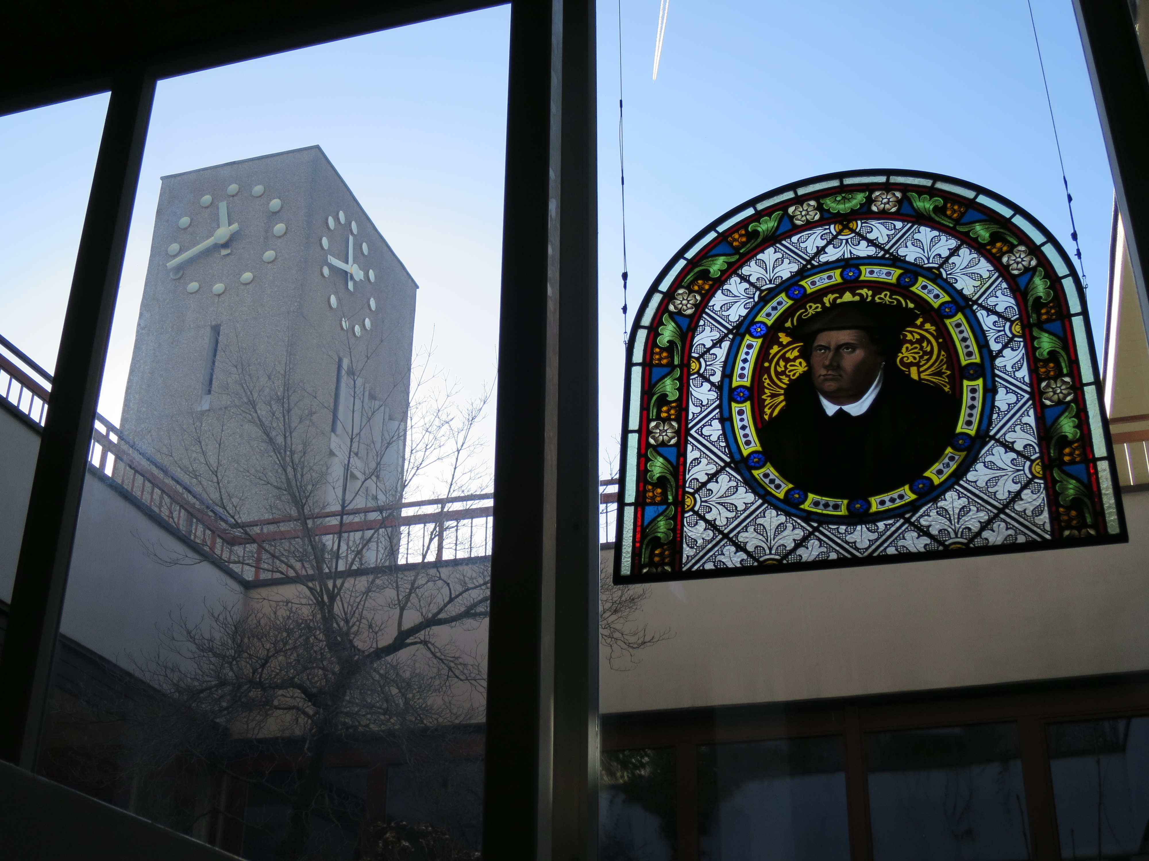 Innenhof mit Bildnis Martin Luthers aus der alten Kirche